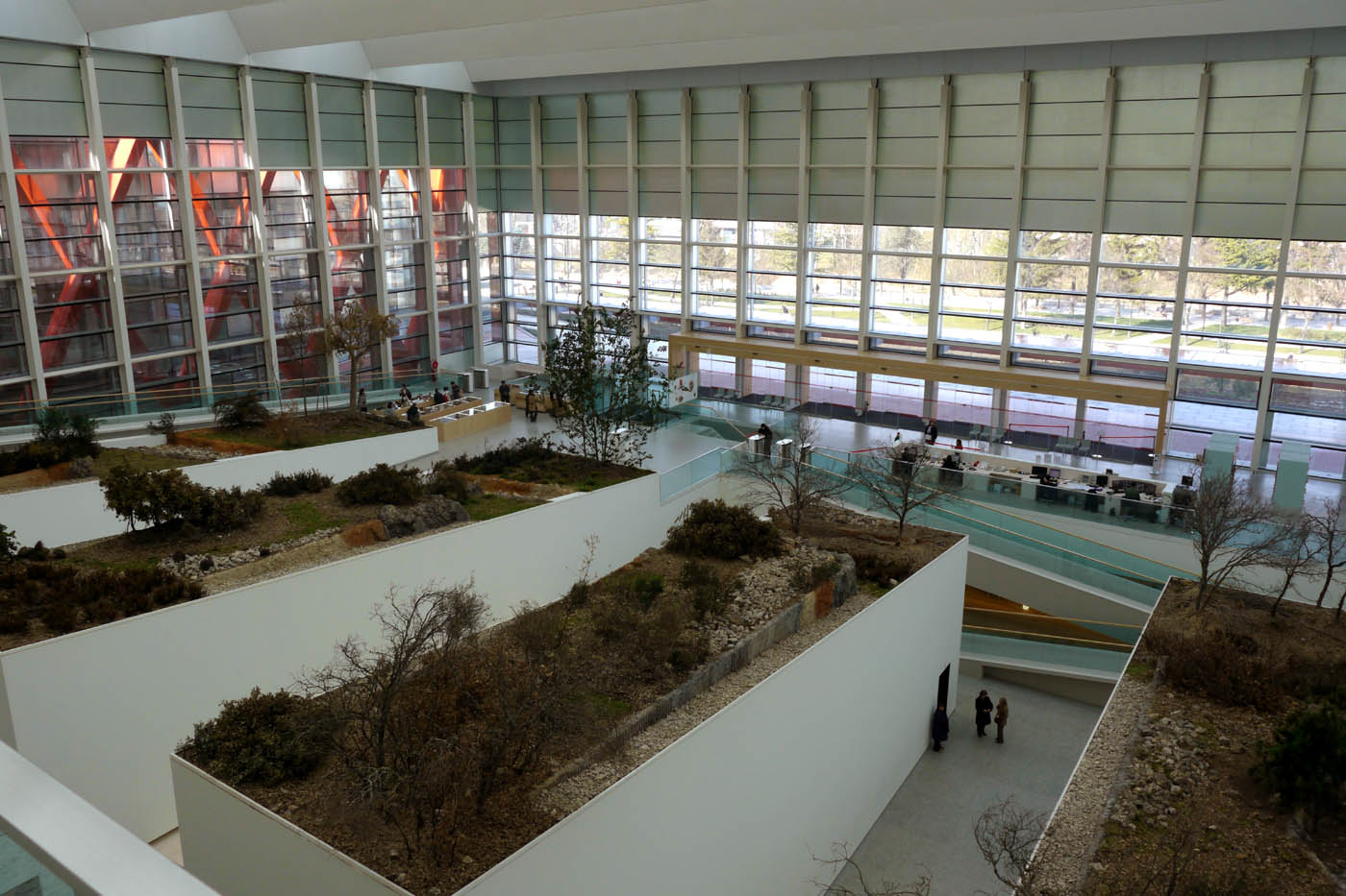 Museo de la Evolución Humana de Burgos.